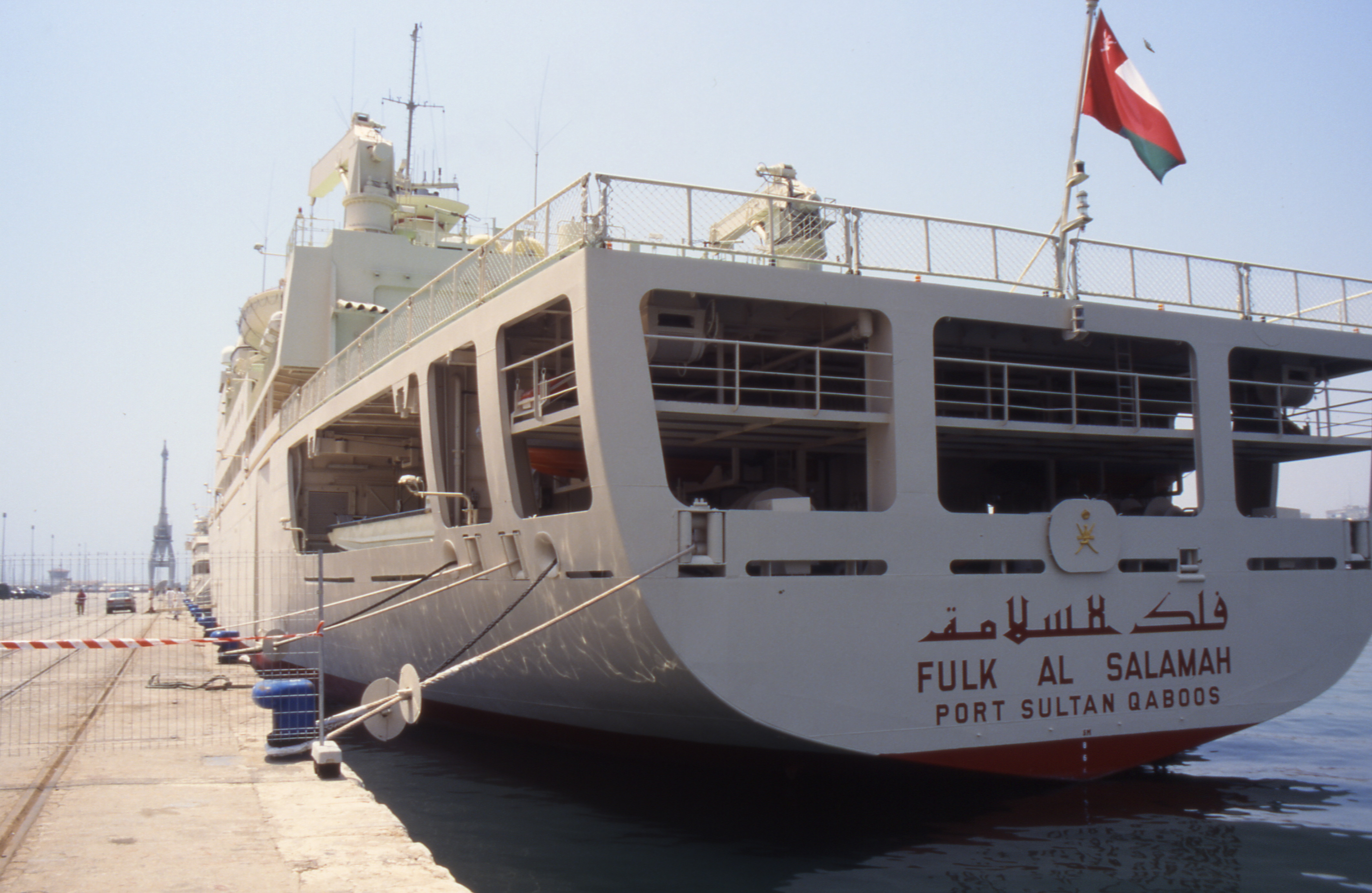 Malaga Hafen